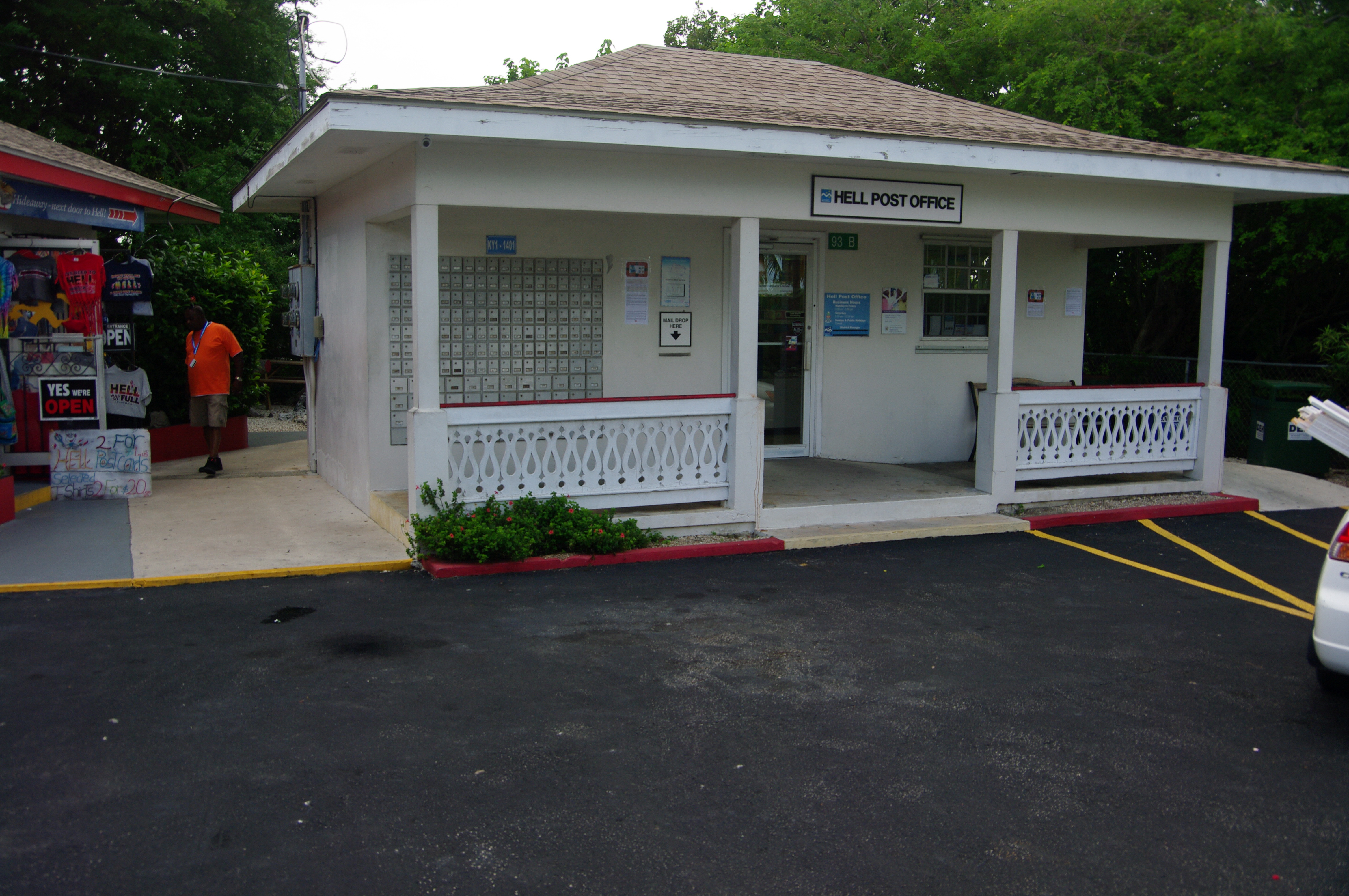 West bay, Hell Post Office